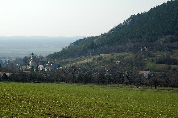 Plavecké Podhradie Source=self Date=15.8.2006 Autor = Marek Fabian Permission=GFDL other_versions=no